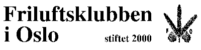 Logo Friluftsklubben